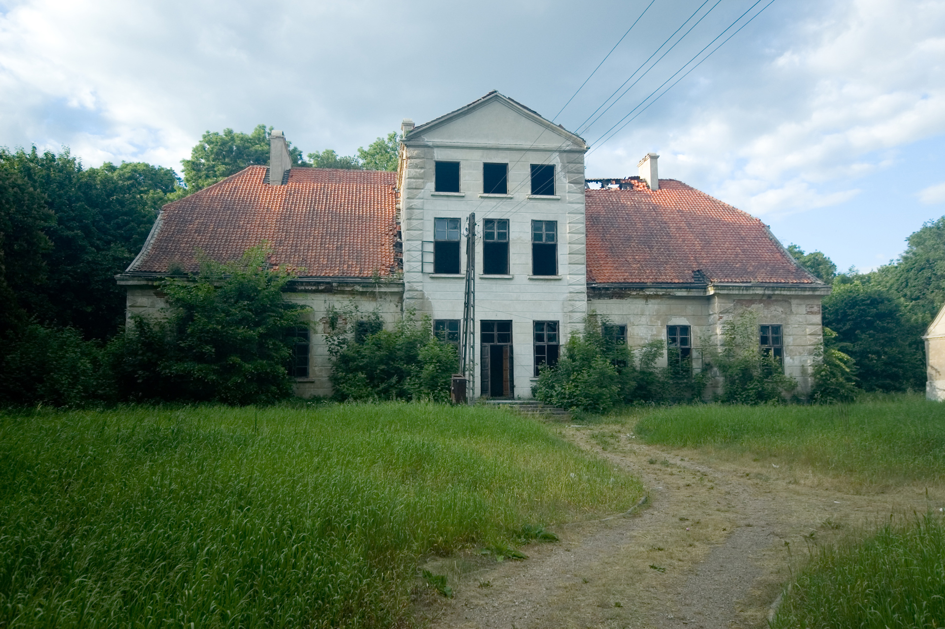 Bieżuń - zespół pałacowy i założenie obronne z 1 poł. XVII w. (zabytek nr A-89)